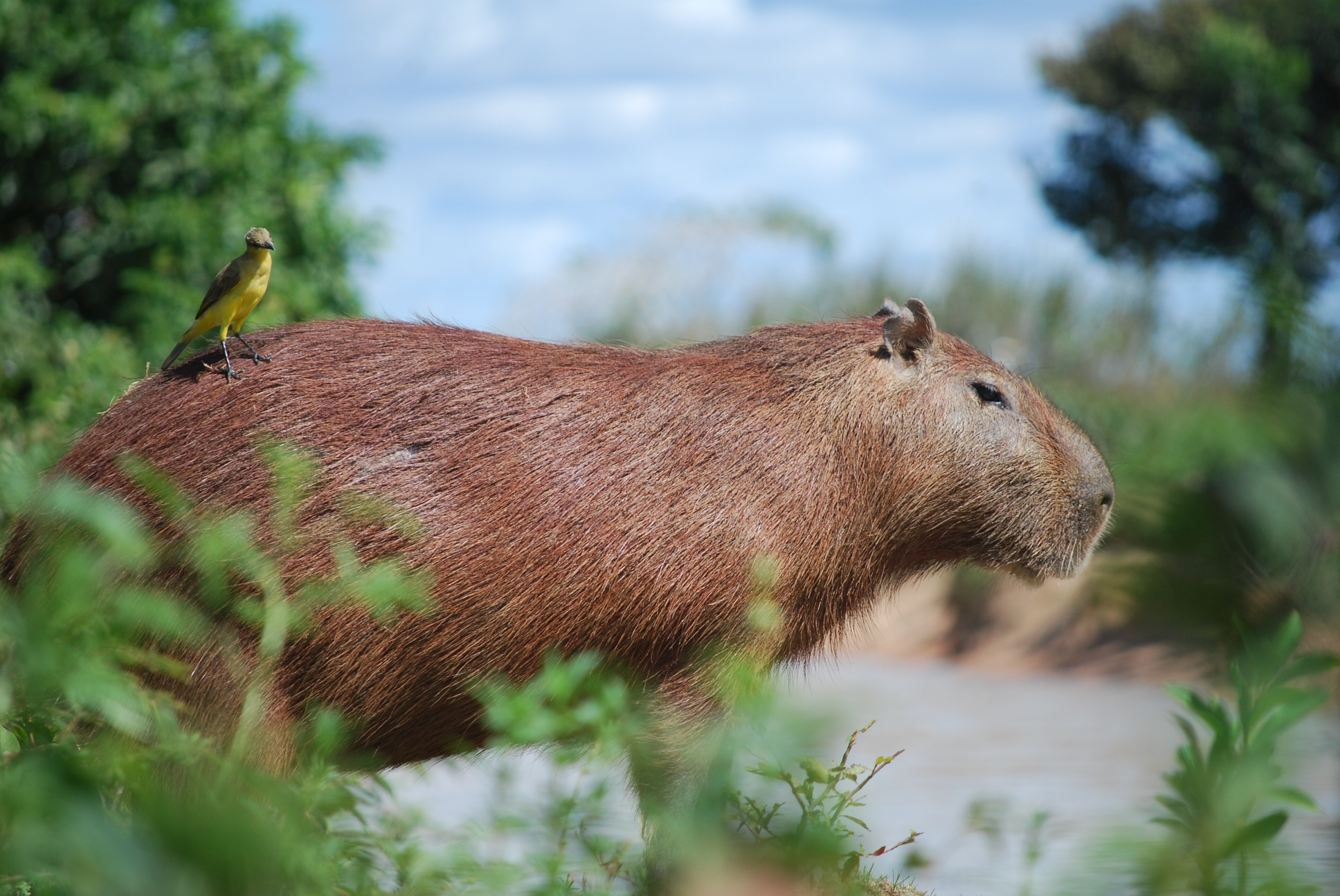 Esta foto fue tomada en el Hato El Cedral del Estado Apure donde se observa a un pajarito que ha venido a hacerle una limpieza de pelaje al roedor mas grande, "El Chiguire"